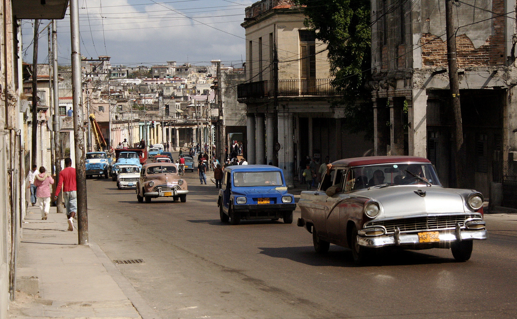 Street in Havanna